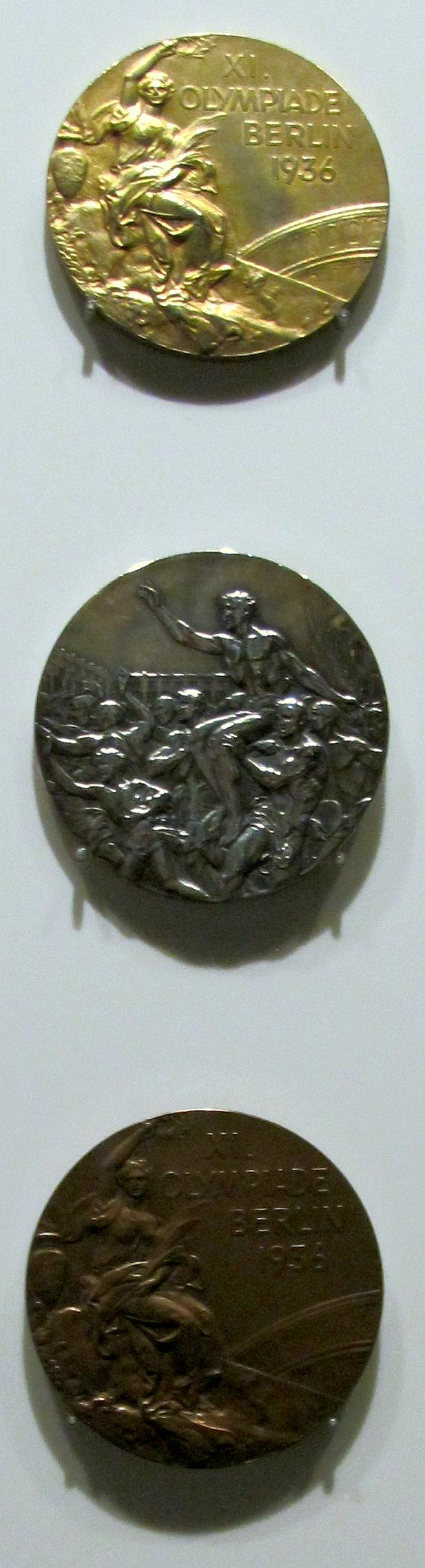 Musée Olympique, Losanna